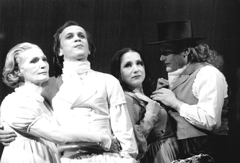 ADN-ZB-Rehfeld-20.4.81-Berlin: "Dantons Tod", Drama von Georg Büchner, in der Regie von Alexander Lang hat am 24. April Premiere im Deutschen Theater. In dieser Szene spielen Inge Keller (l) die Julie (Dantons Gattin), Margit Bendokat (3.v.l.) die Marion, Christian Grashof (2.v.l.) den Georg Danton und Günter Sonnenberg (4.v.l.) den Mercier.